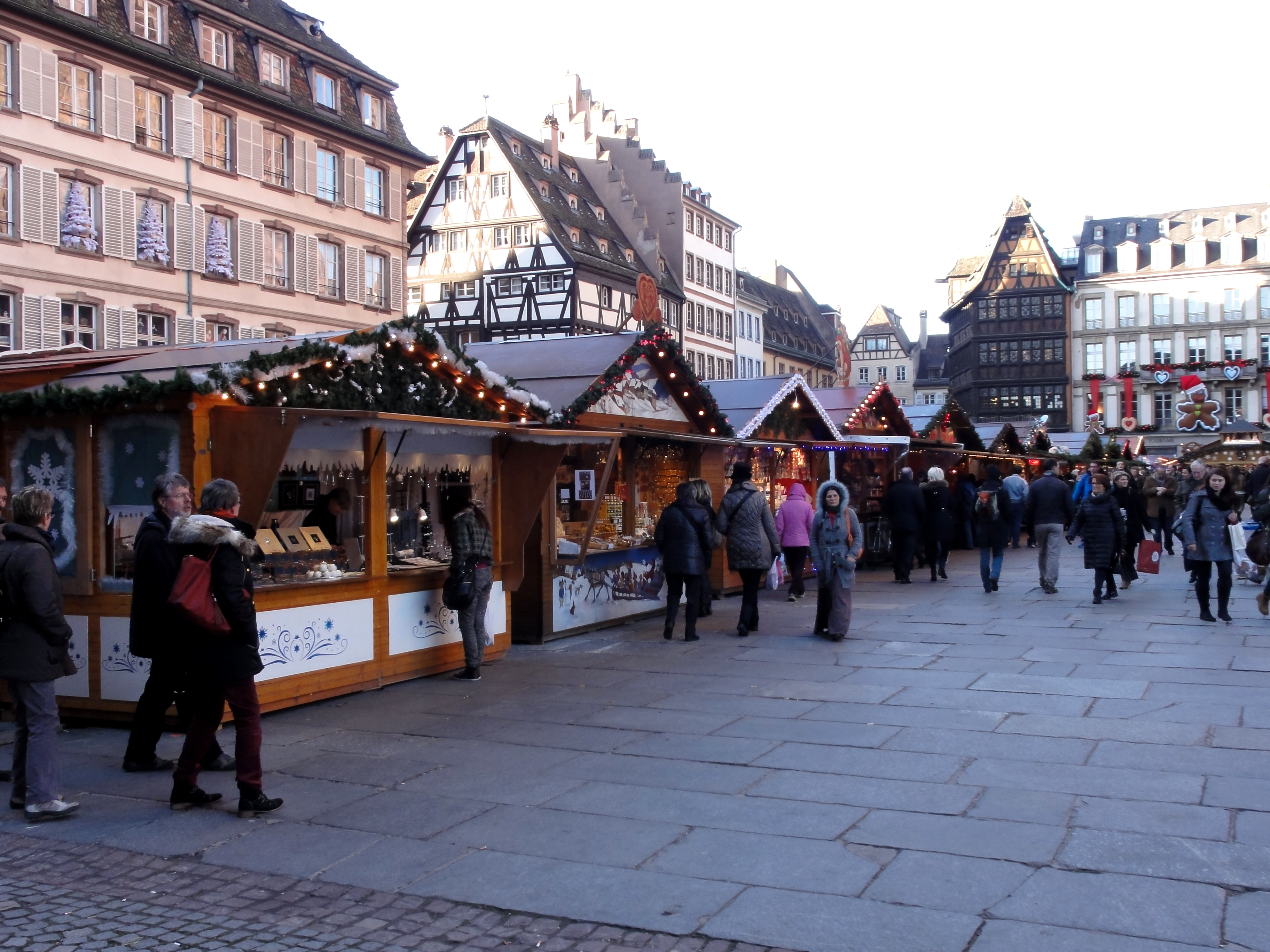 Alsace, Bas-Rhin, Strasbourg, Marché de Noël 2013, place de la Cathédrale.